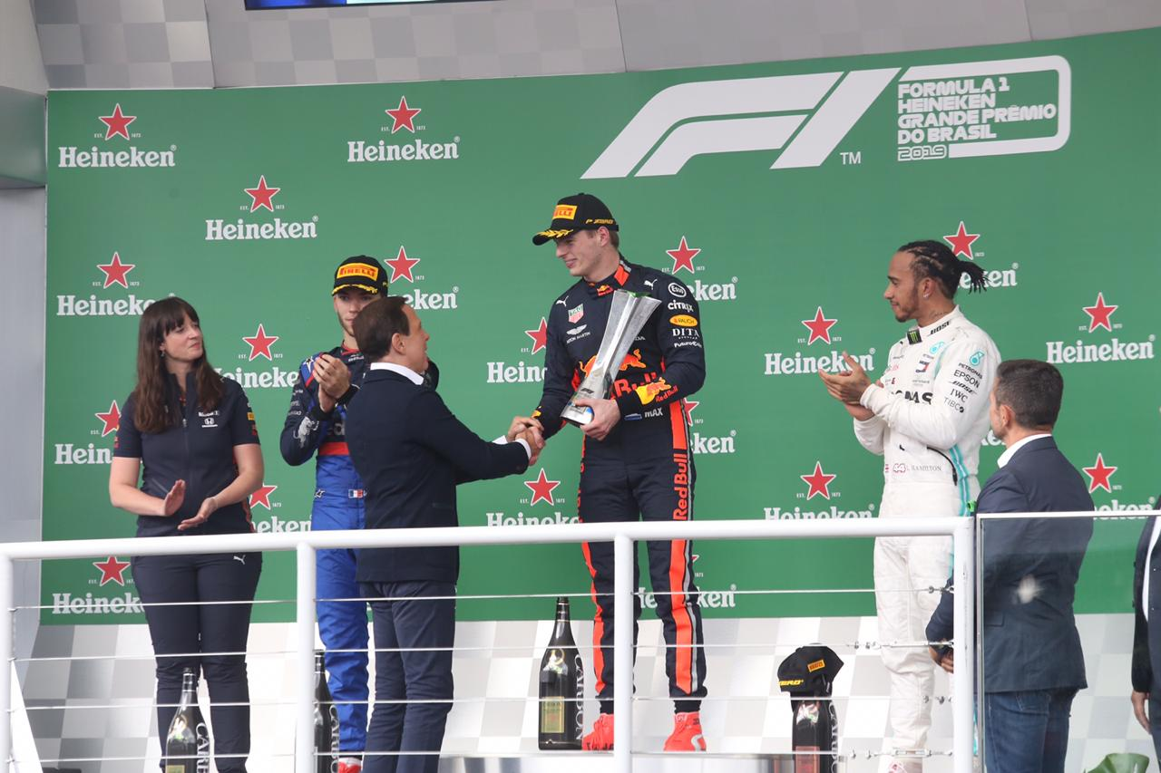 Governador do Estado de São Paulo, João Doria, durante Grande Prêmio do Brasil de F1 2019. Local: São Paulo/SP. Data: 17/11/2019